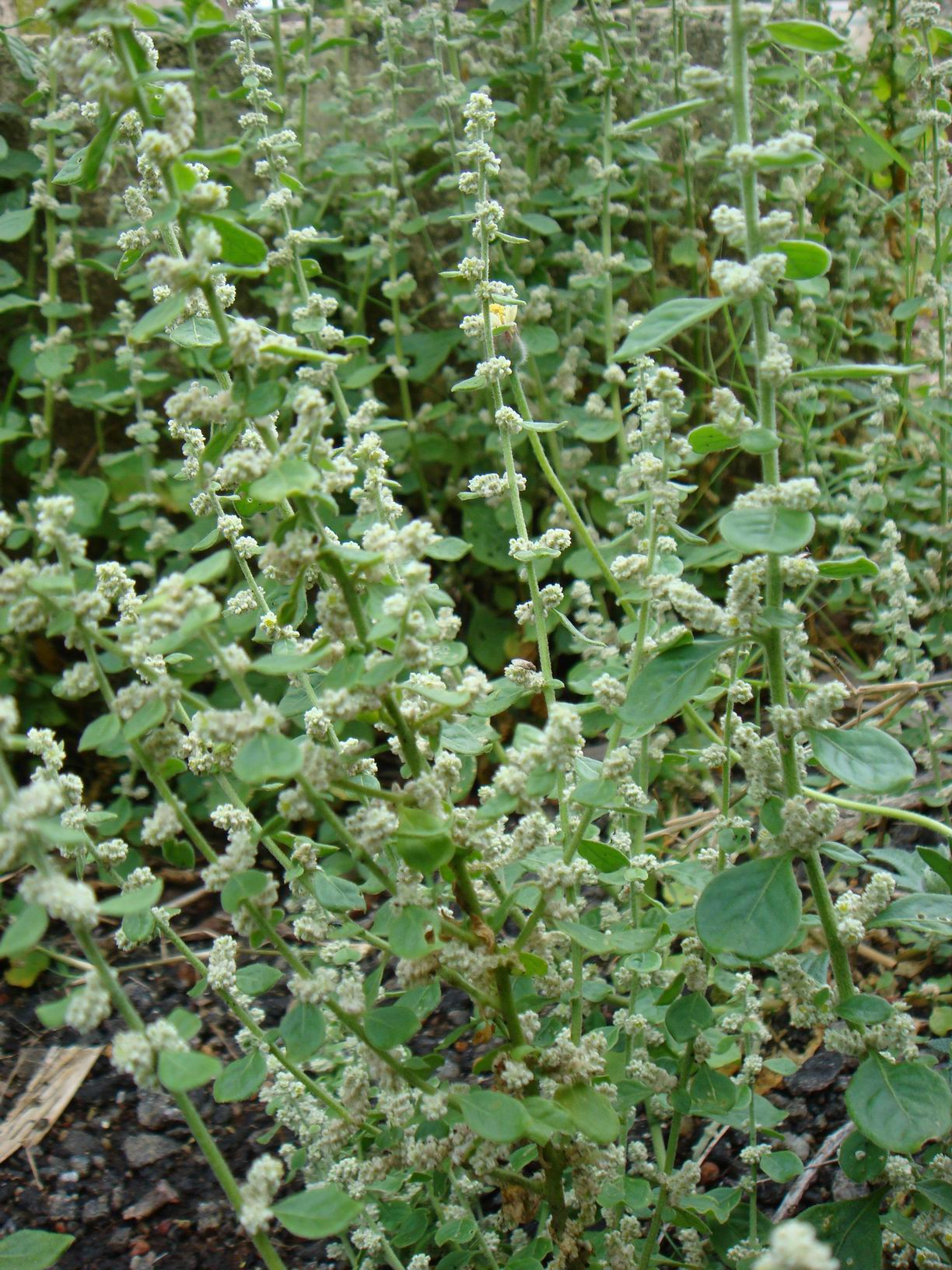 ദശപുഷ്പങ്ങളിലെ ചെറൂളയുടെ ചിത്രം സ്വയം എടുത്തത് )